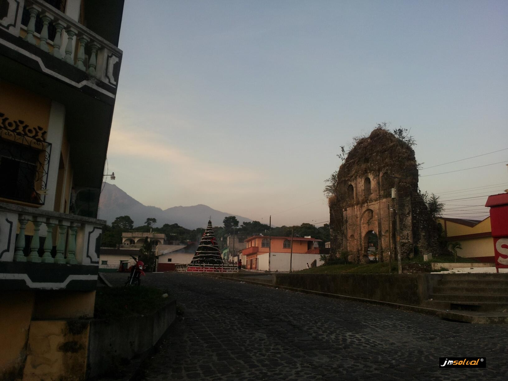 Centro de la ciudad de San Pablo Jocopilas municipio del departamento de Suchitepéquez, Guatemala.